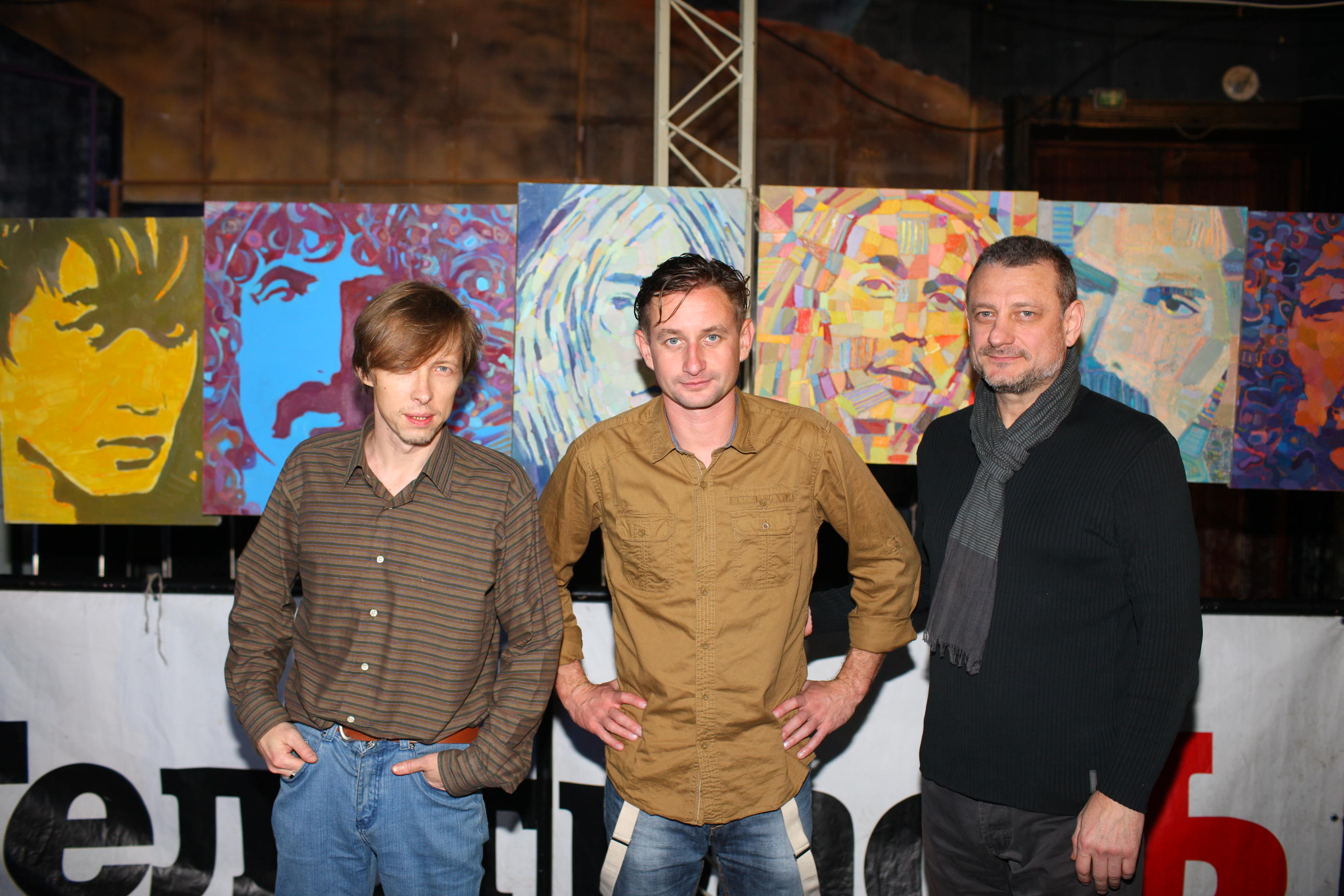 Алексей Рубанов, Сергей Жадан и Олег Филипас в Кременчуге